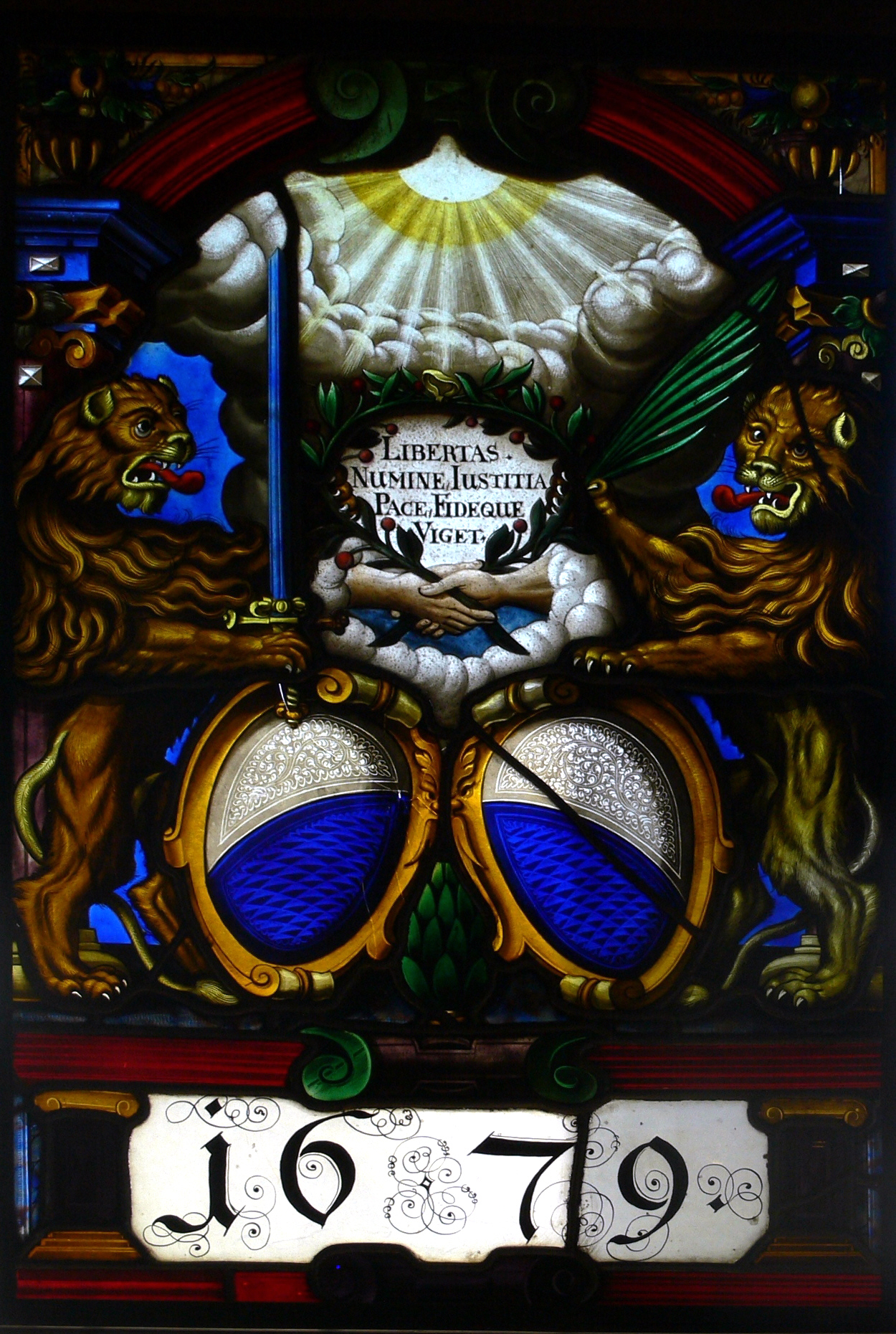 Wappenscheibe "Zürich", 1679, Museum zu Allerheiligen, Schaffhausen. Libertas Numine Iustitia Pace Fideque Viget.